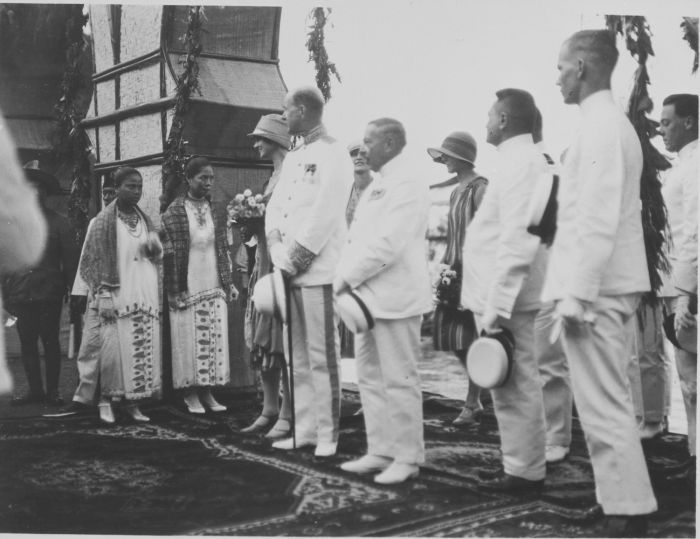 Foto. Ontvangst van Gouverneur-Generaal De Graeff in de Baai van Gorontalo